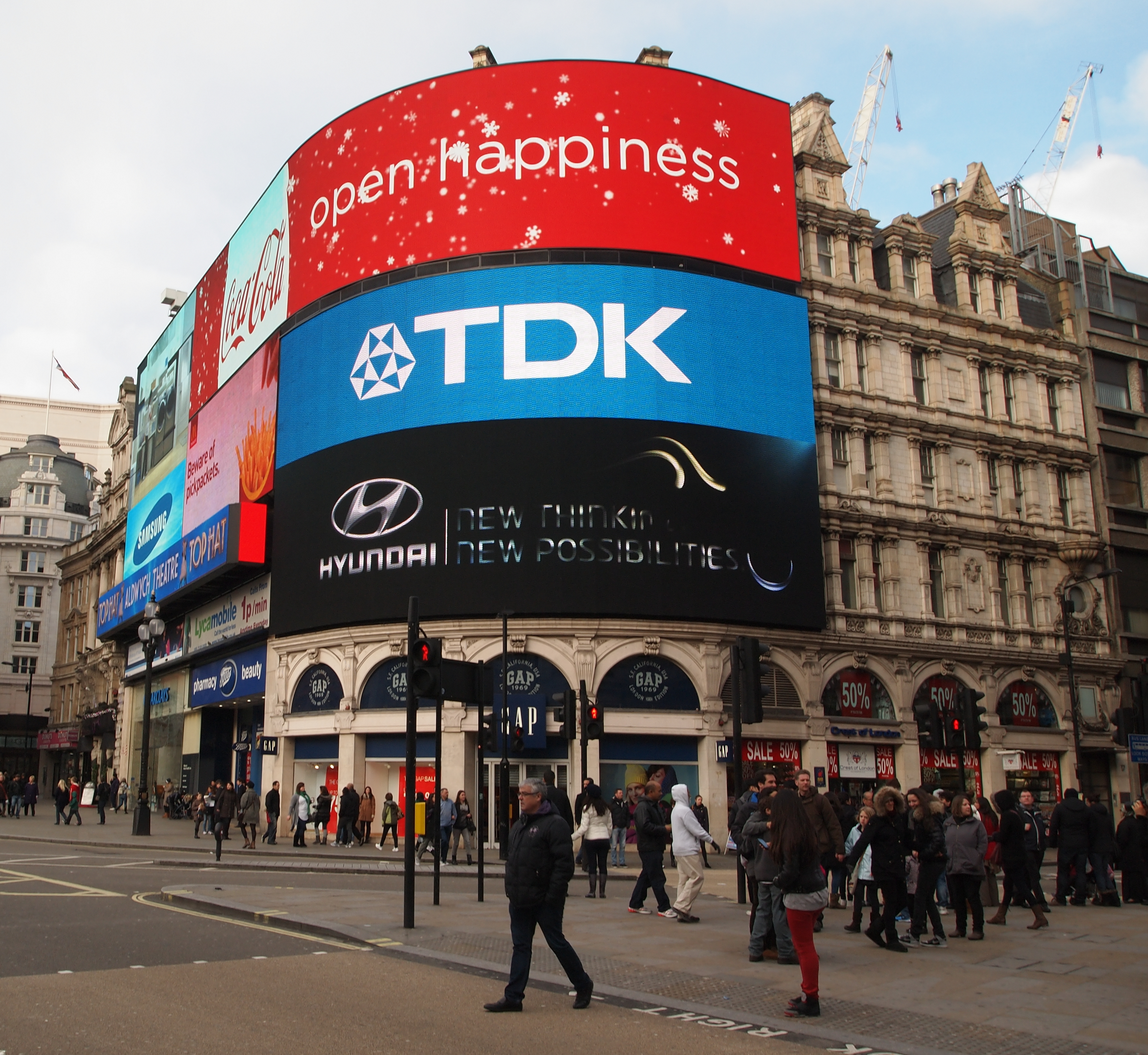 Piccadilly Circus, Londen